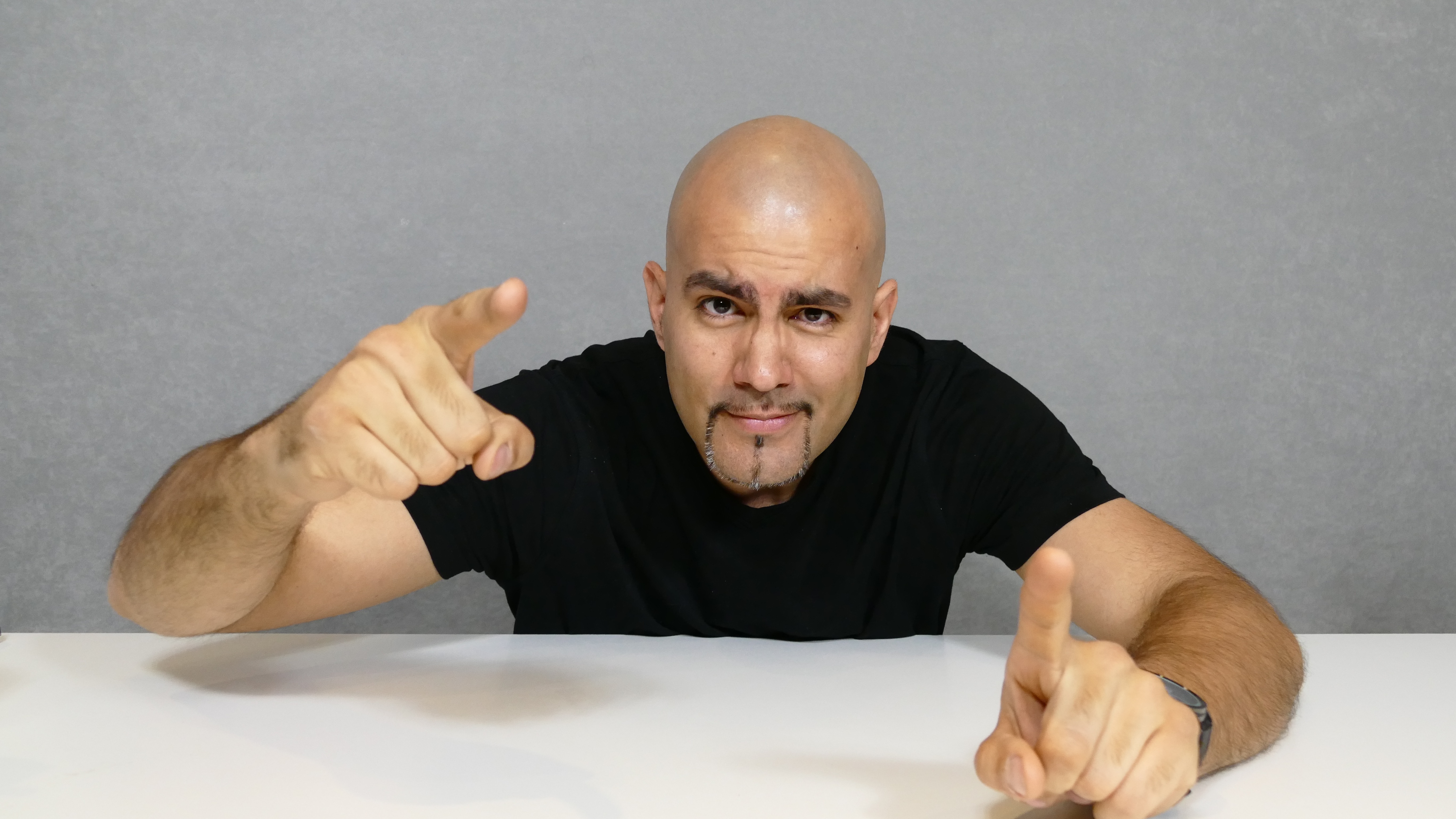 Def Cut 2017